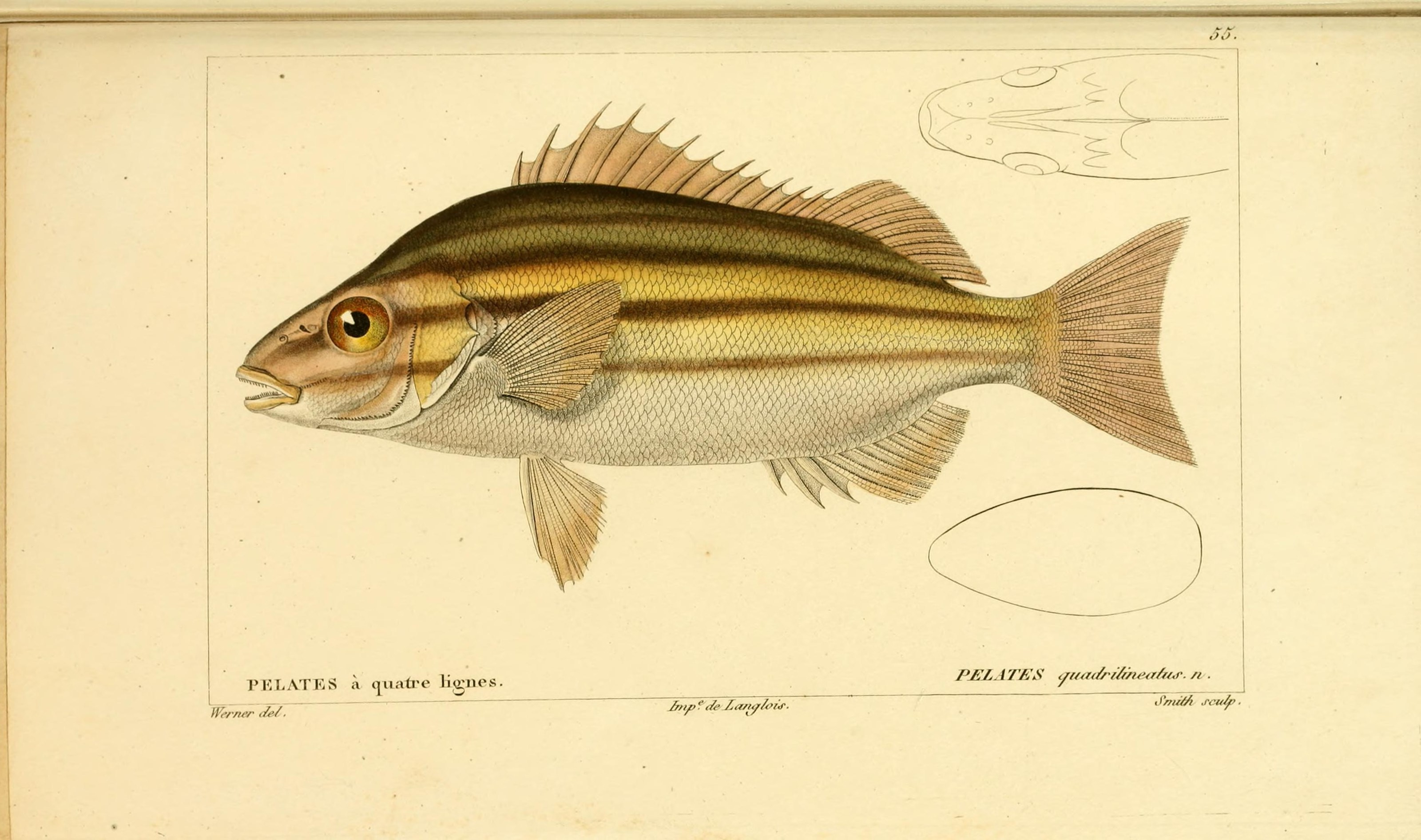 Pelates quadrilineatus Histoire naturelle des poissons / par m. le bon Cuvier ... et par M. Valenciennes.